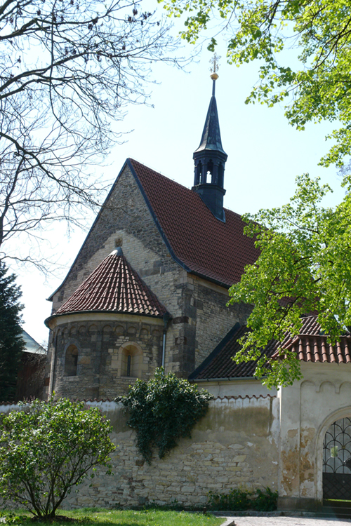 Kostel Stětí sv. Jana Křtitele